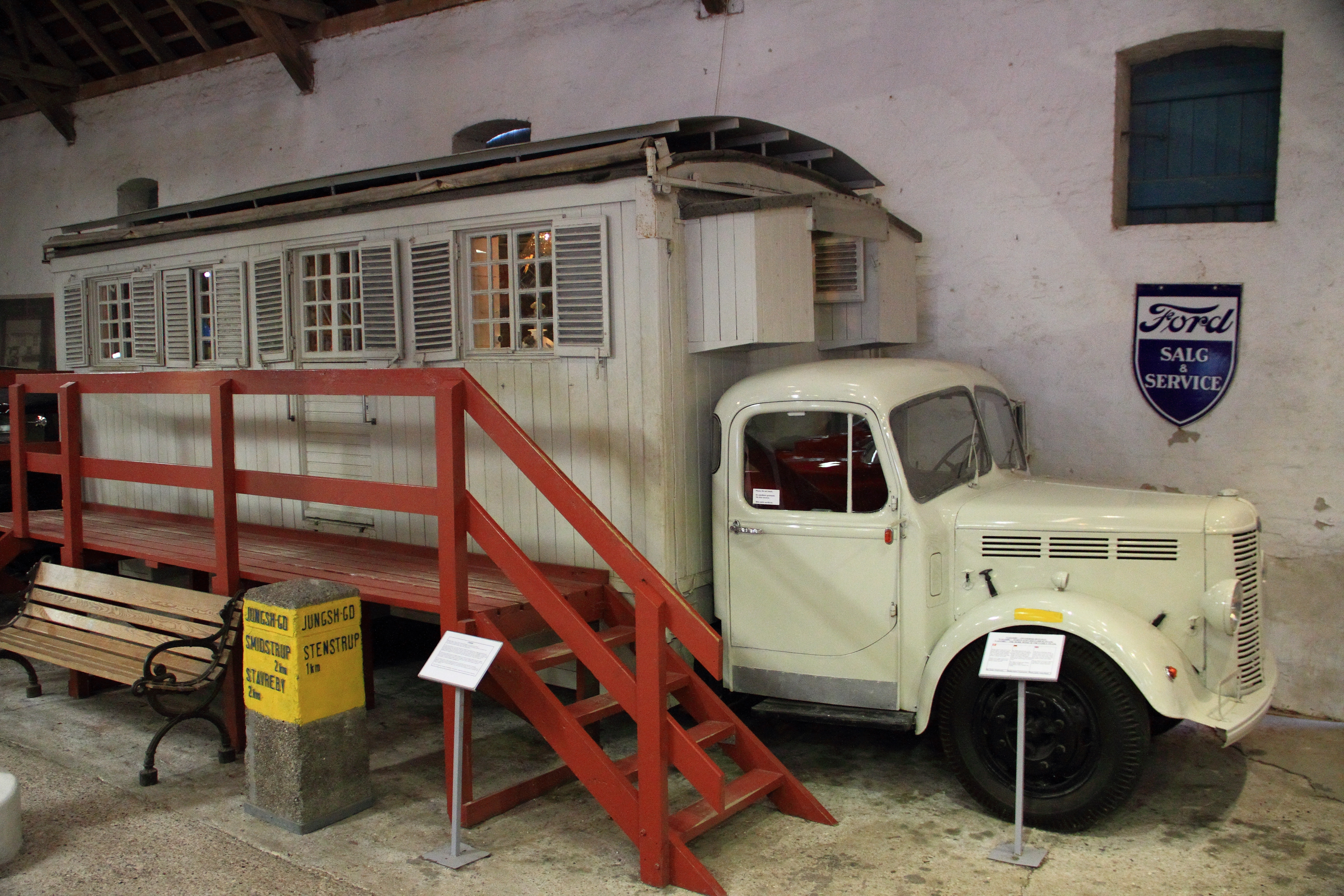 Im Museum von Schloss Egeskov. Hier das Wohnmobil des Malers Sigurd Swane und seiner Frau Agnete.